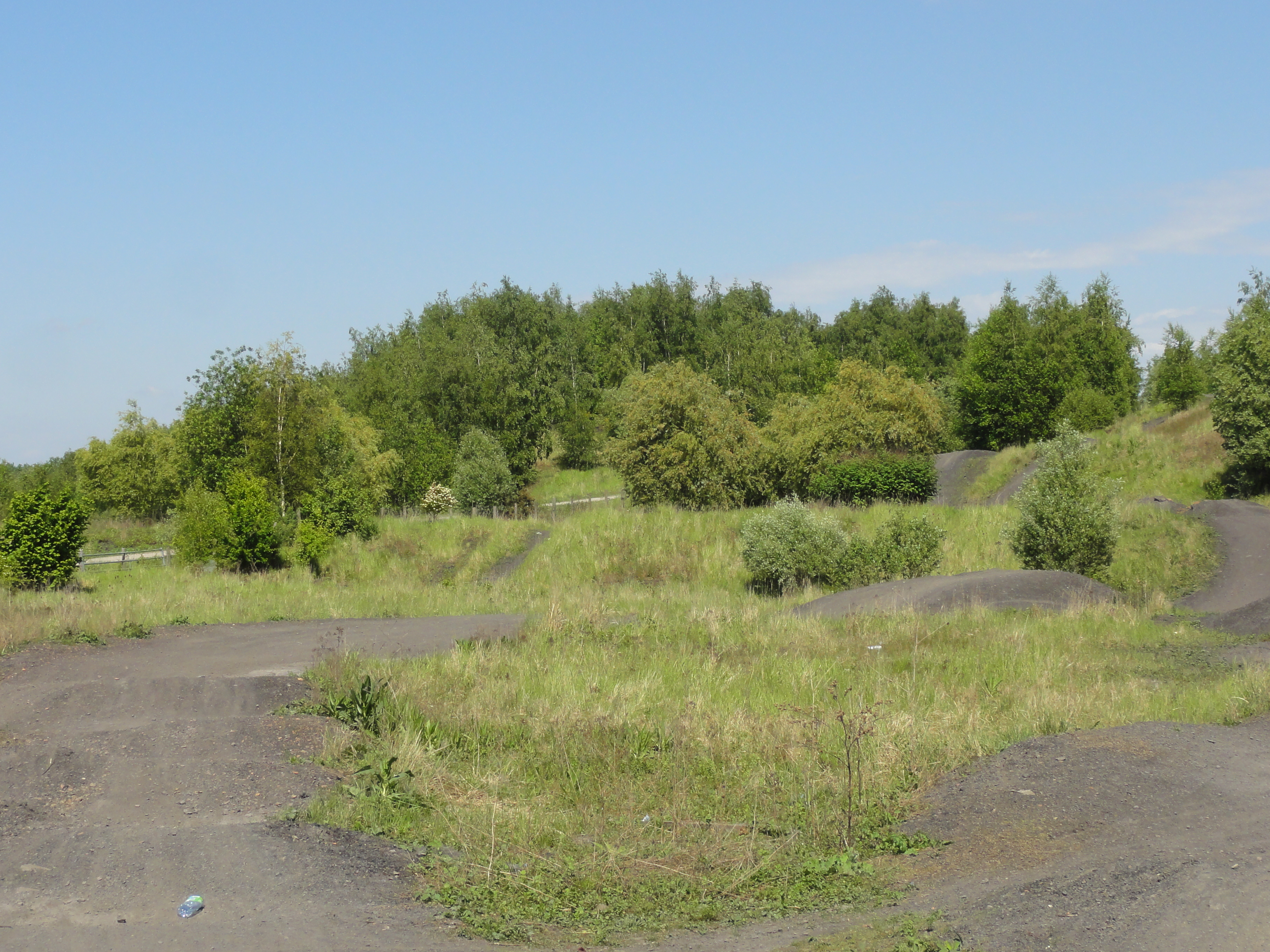 Terril n° 254, sans dénomination, Fosse De Sessevalle de la Compagnie des mines d'Aniche (principalement), Pecquencourt, Nord, Nord-Pas-de-Calais, France.